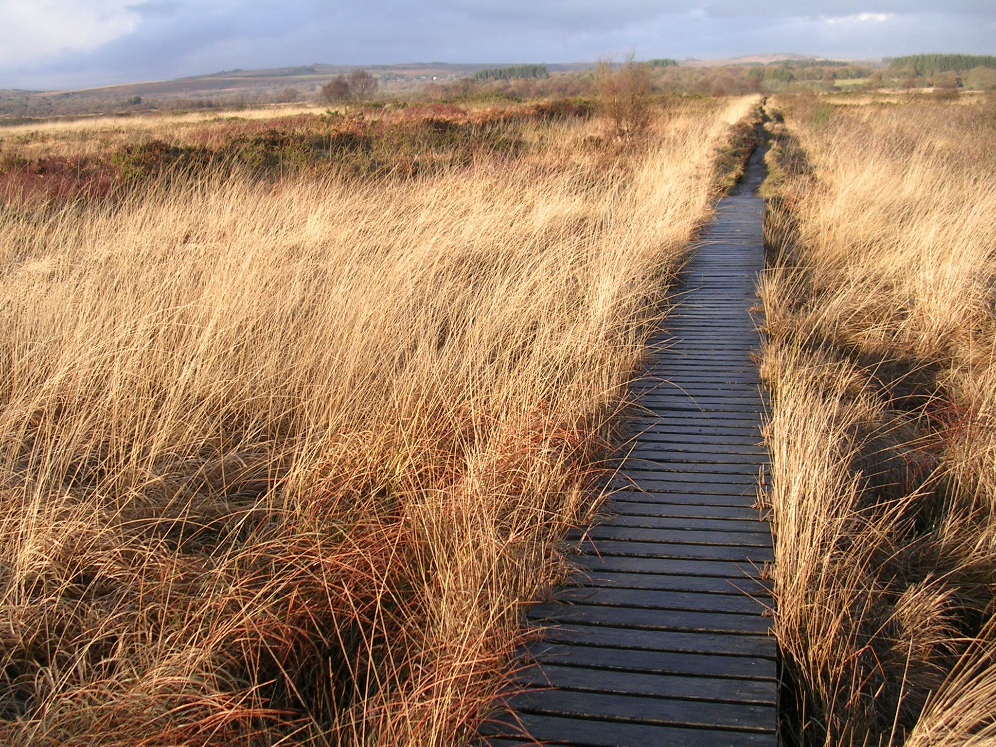 Paysage typique de la réserve